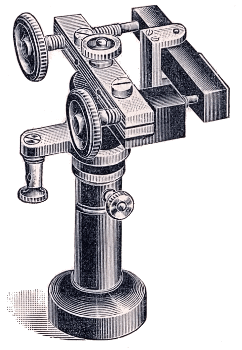 Deprez interruptor